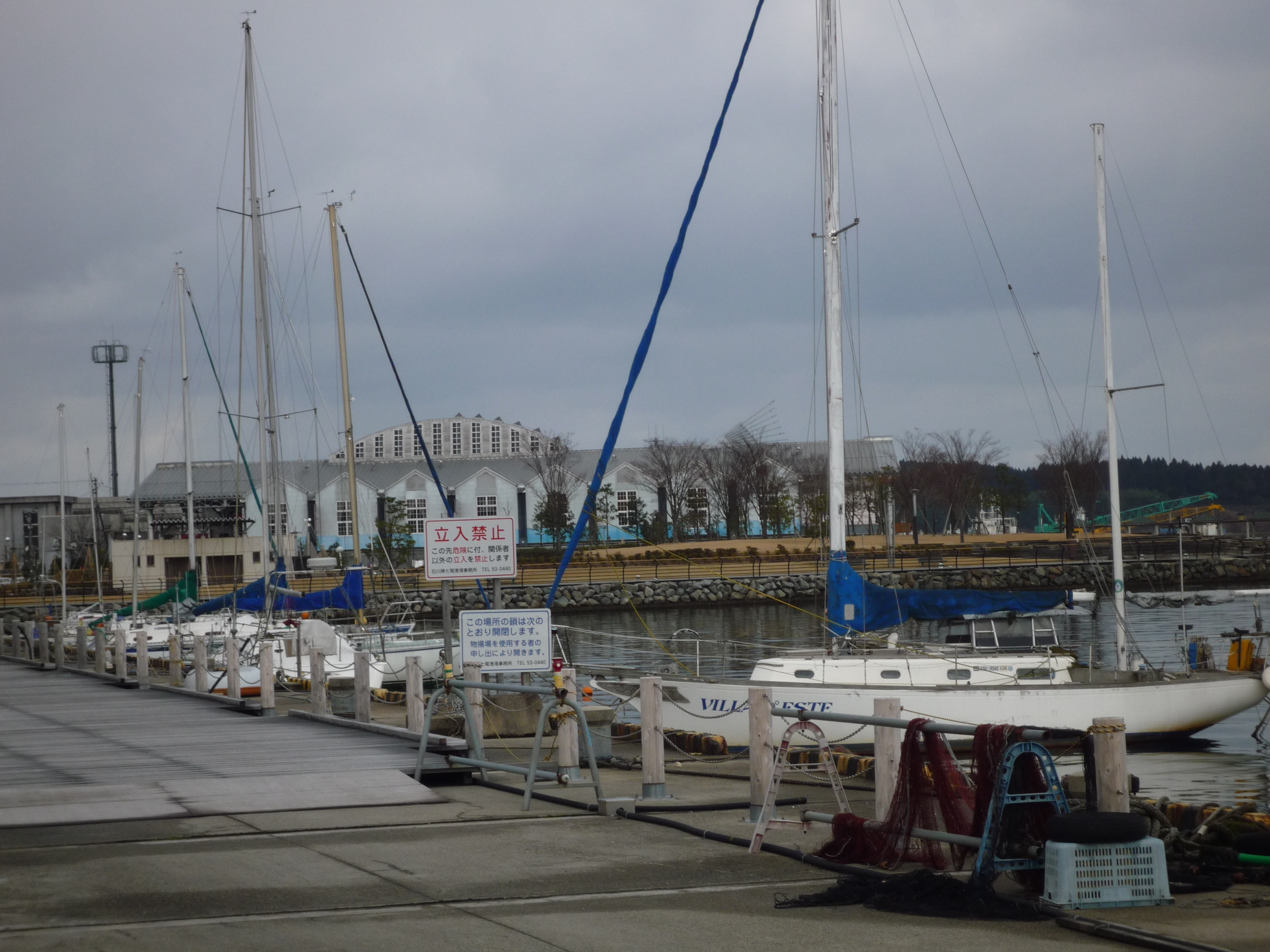 nanao port